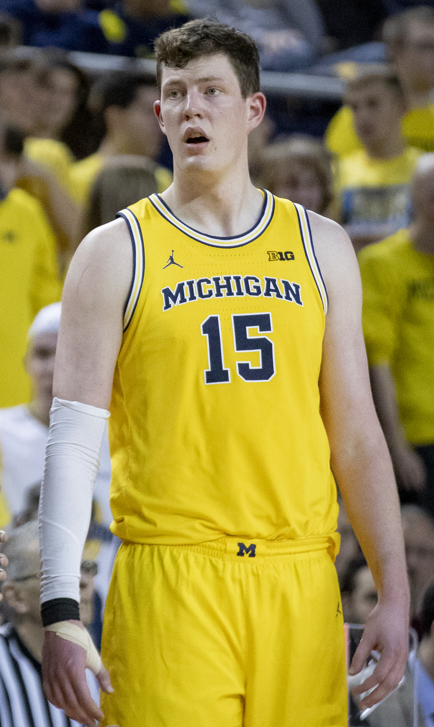 _O6A0334